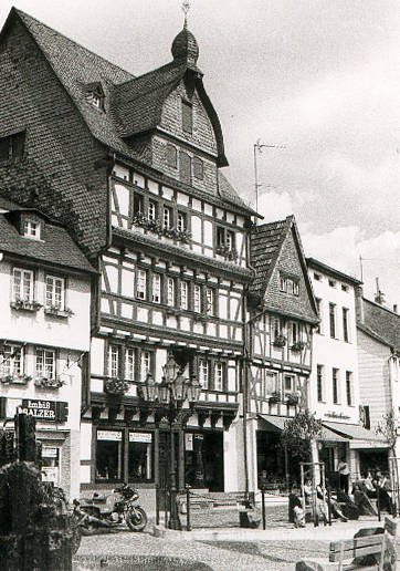 Adenau